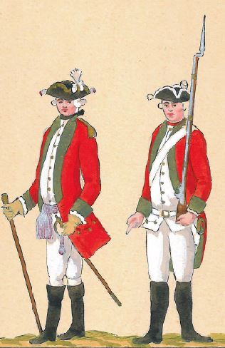 36. Regiment Pieszy Buławy Wielkiej Koronnej